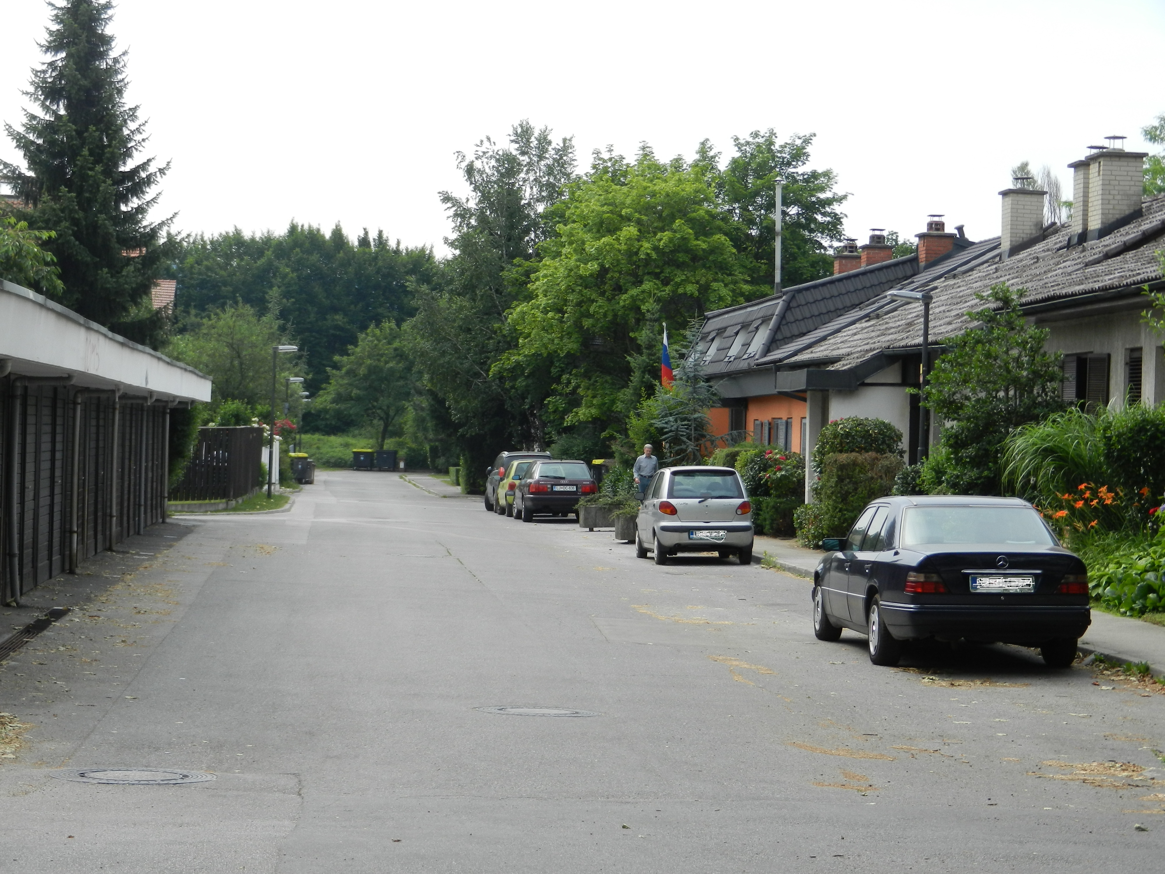 Javna pot - dostopna cesta v naselju